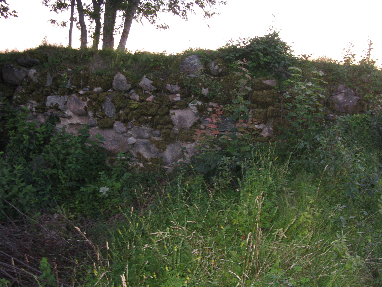 Põhjapoolse hoonetiiva läänesein.